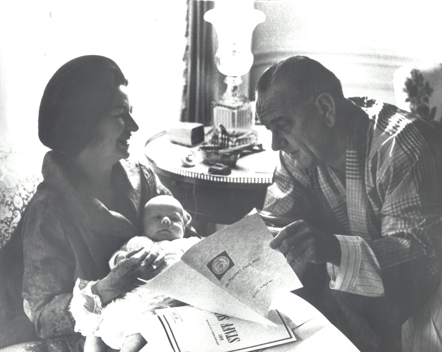 PDB 2015 Release